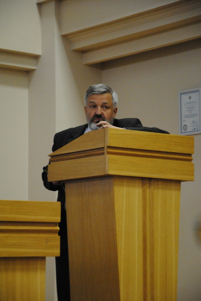 Фотография Александра Владимировича Пузырёва